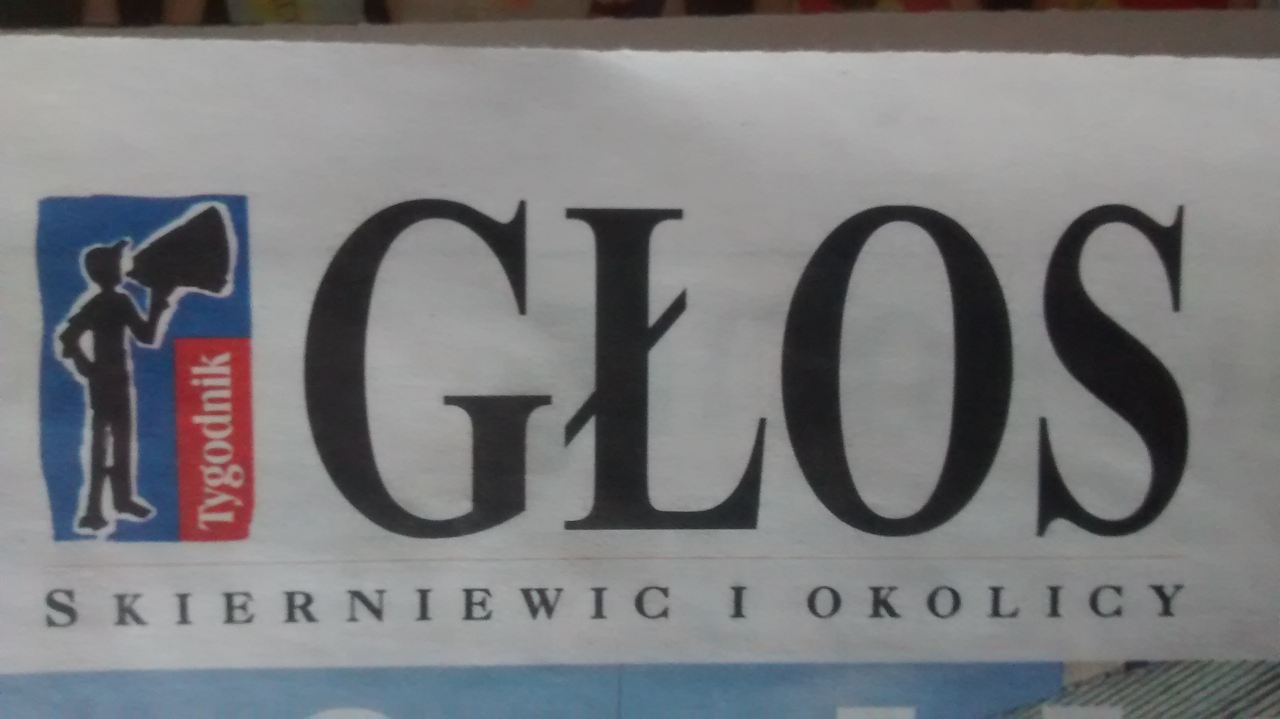 Głos Skierniewic i Okolicy - gazeta lokalna